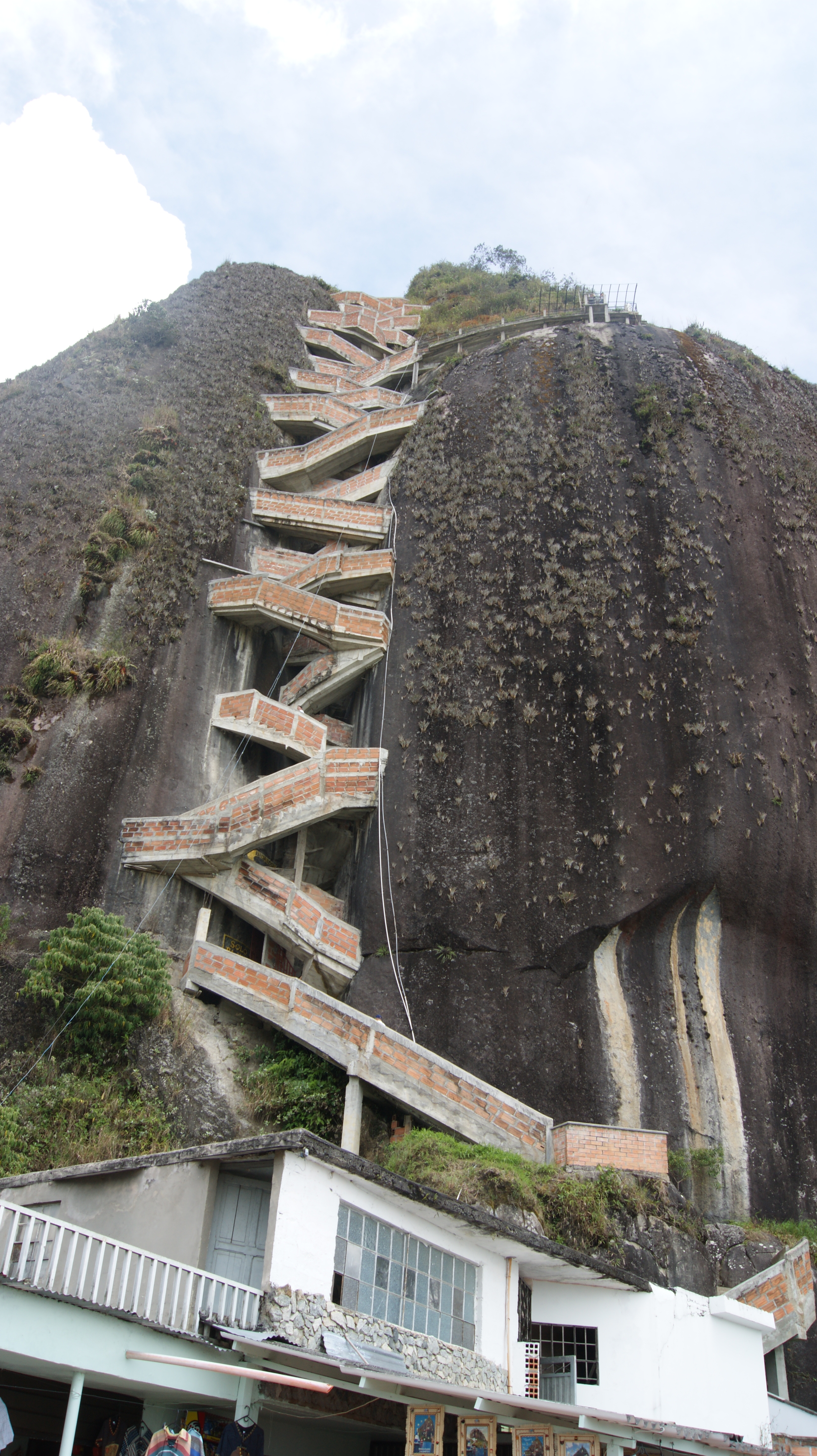 Vista de lal escaleras para subir a la Piedra del Peñol. Guatapé, Antioquia, Colombia.